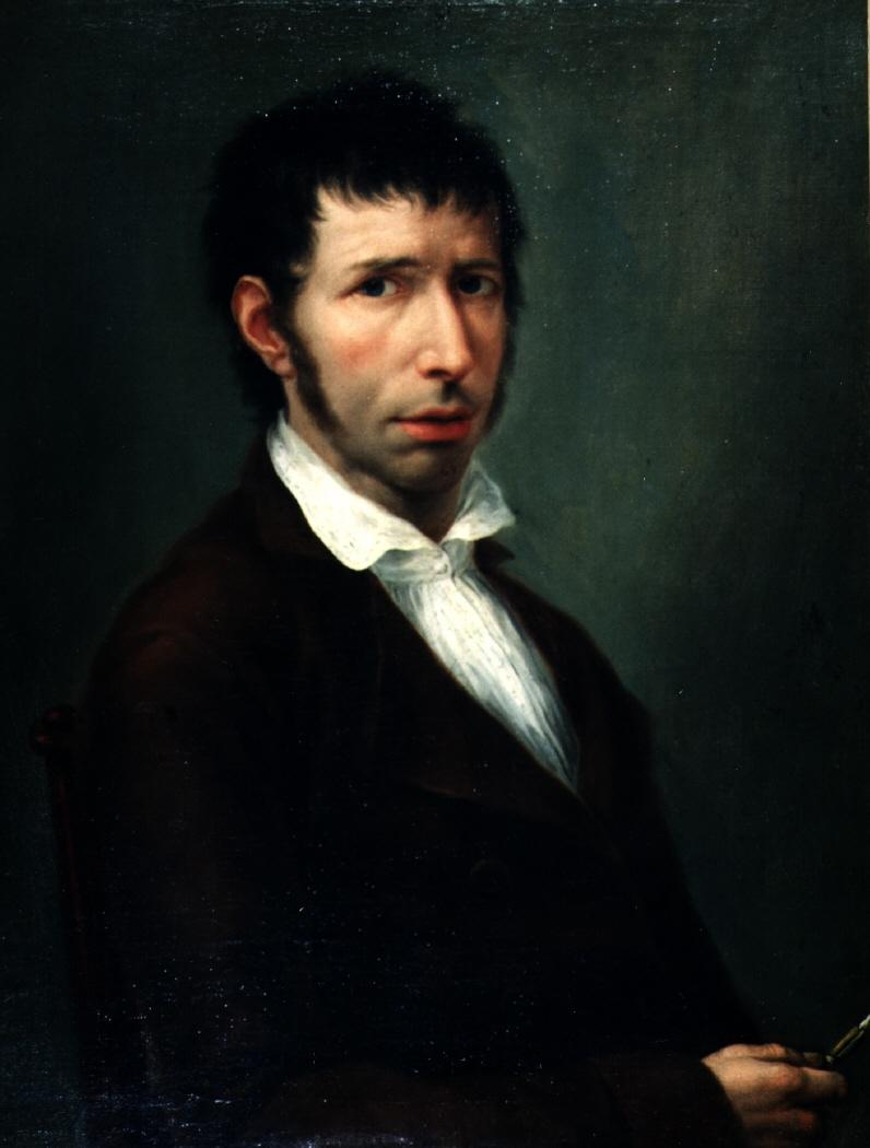 Autorretrato del pintor español Ramón Bayeu (1746-1793).